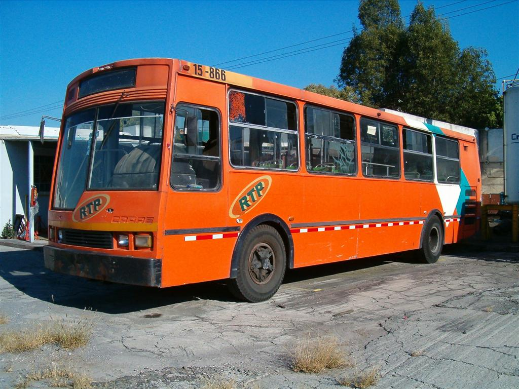 Un autobús (#15-866) de la Red de Transporte de Pasajeros del D.F., heredado de los autobuses de la extinta Ruta 100.